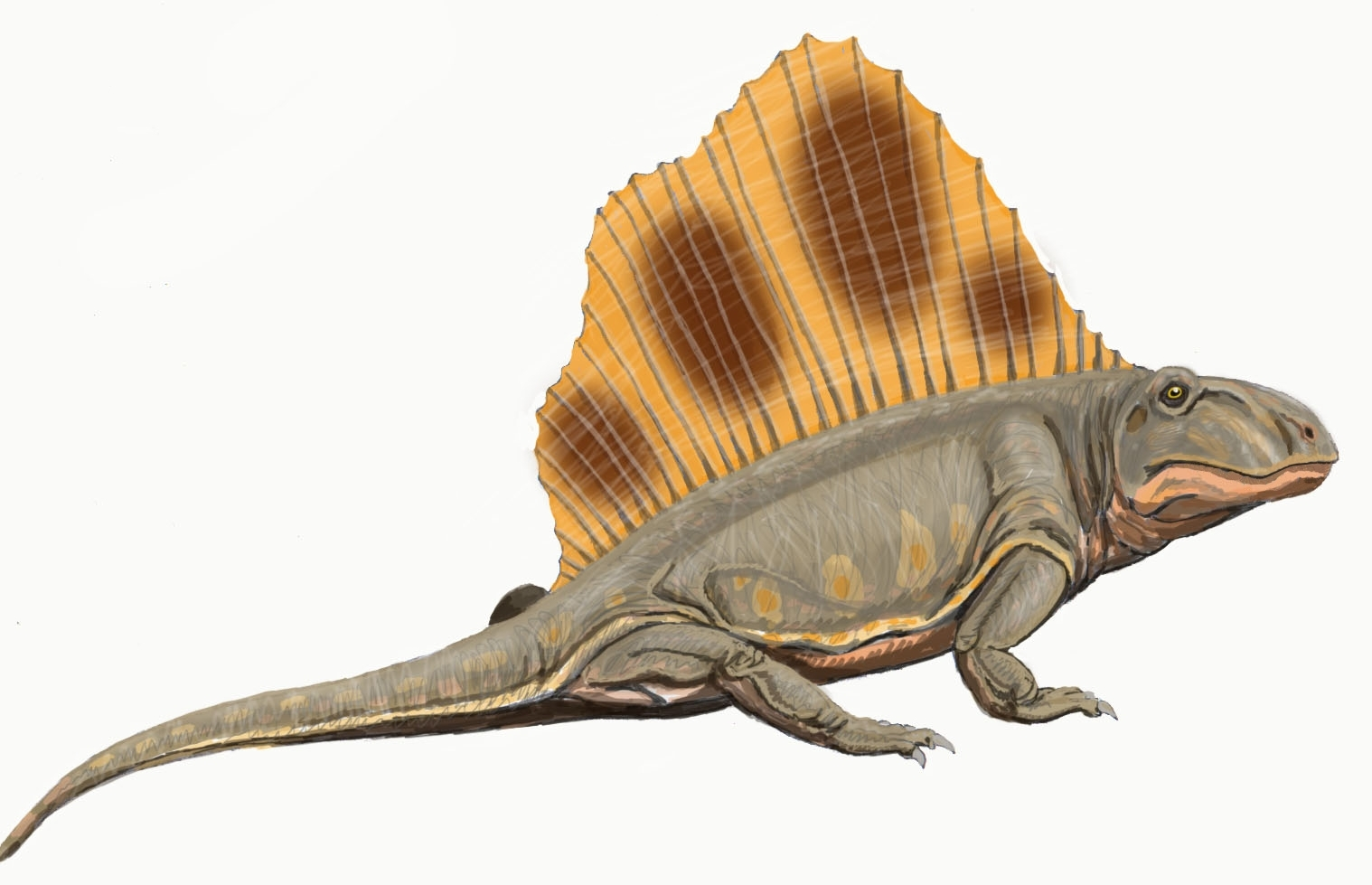 Диметродон Лумиса (Dimetrodon loomisi), длина около 2 метров.